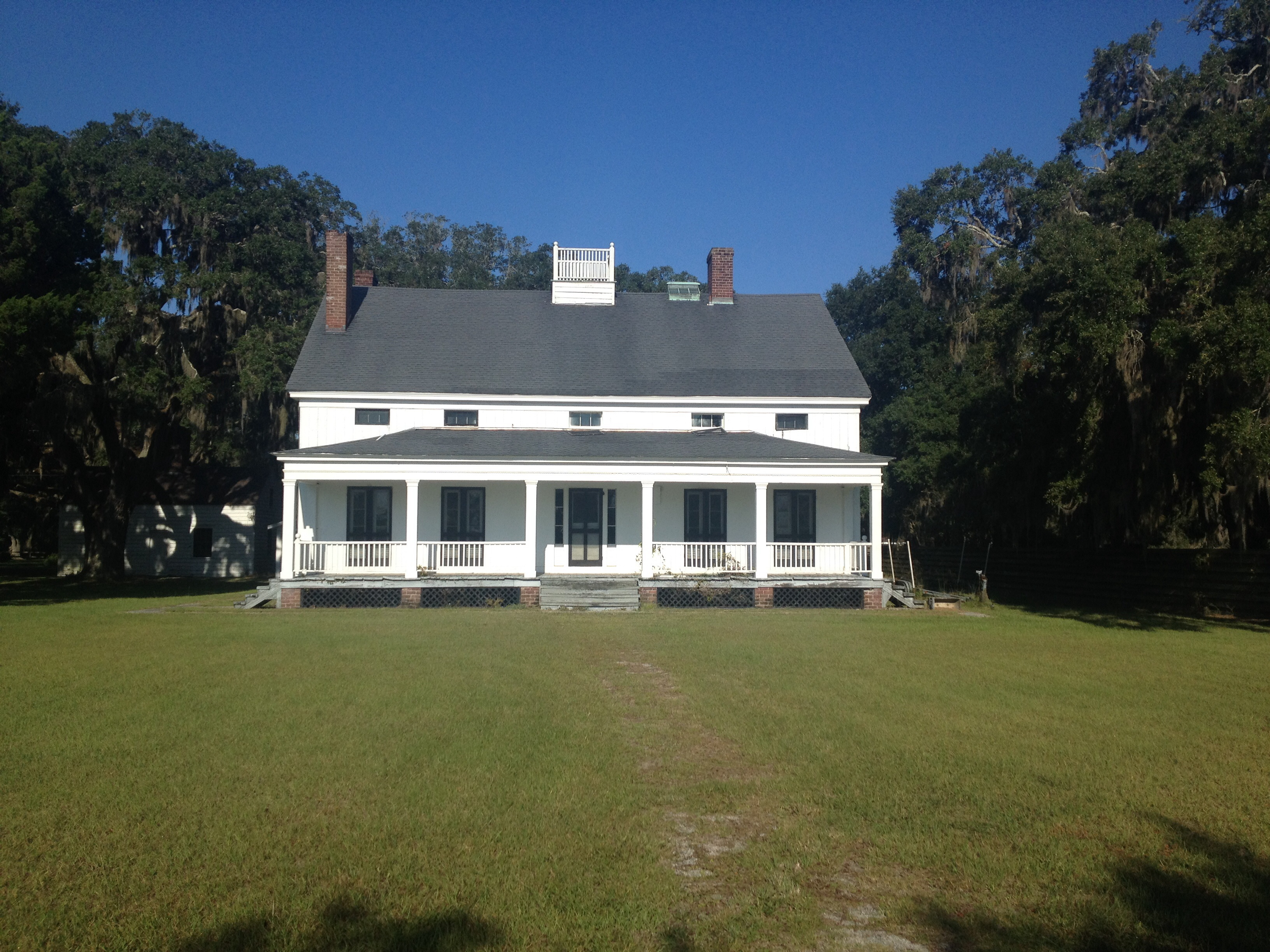 Kilkenny